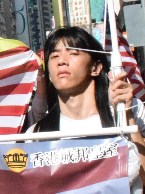 中文（香港）: 中出羊子與幾位支持者，手持美國國旗，以及用中英文寫上「注意﹗香港出現伊朗式選舉」的橫額參與遊行。中出羊子接受美國之音訪問表示，今屆立法會地區直選，出現北京篩選候選人的情況，有如伊朗式選舉，是嚴重的違憲事件，影響選舉的公平。